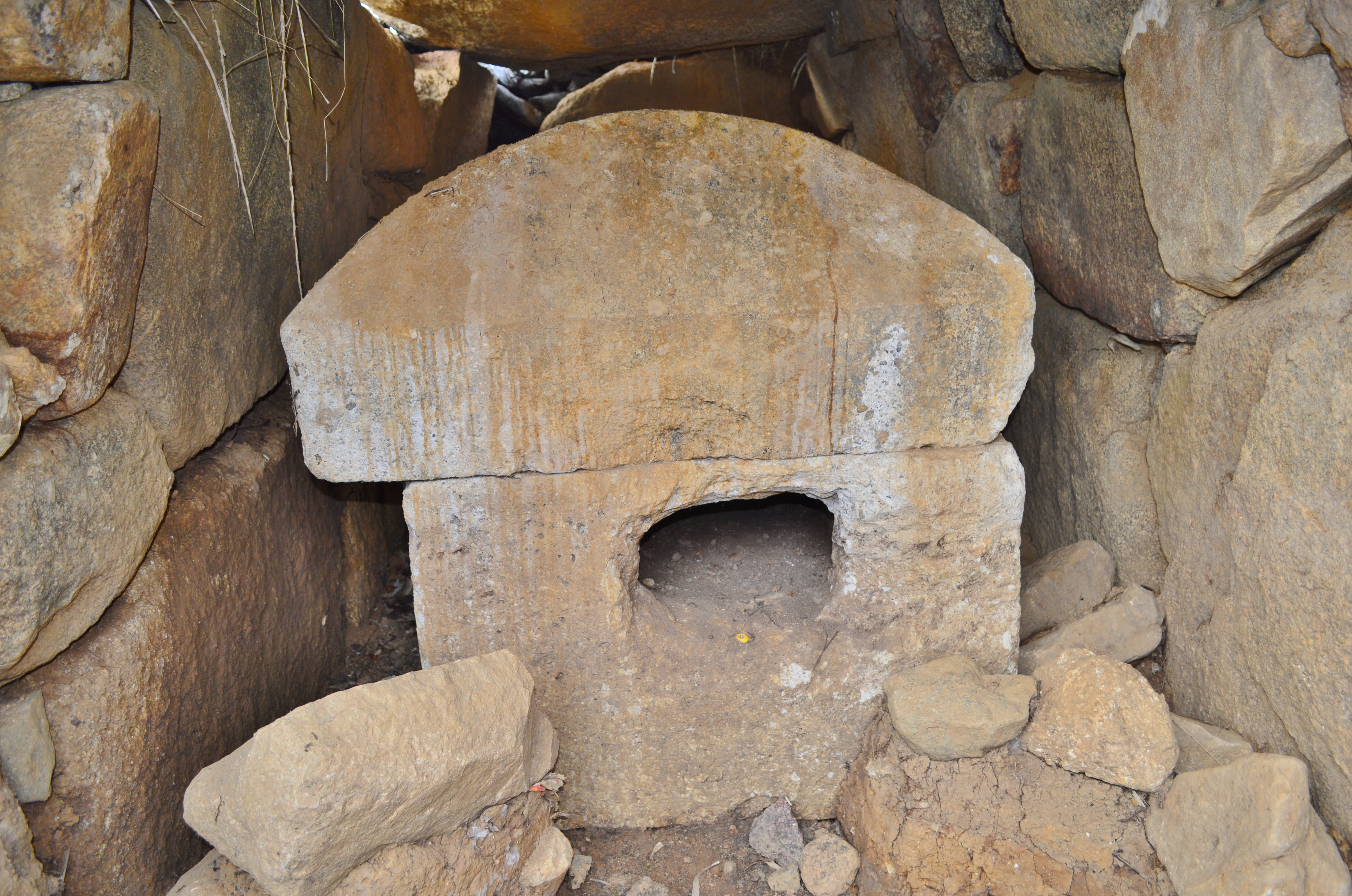 二子塚古墳 (大阪府太子町) 東石室